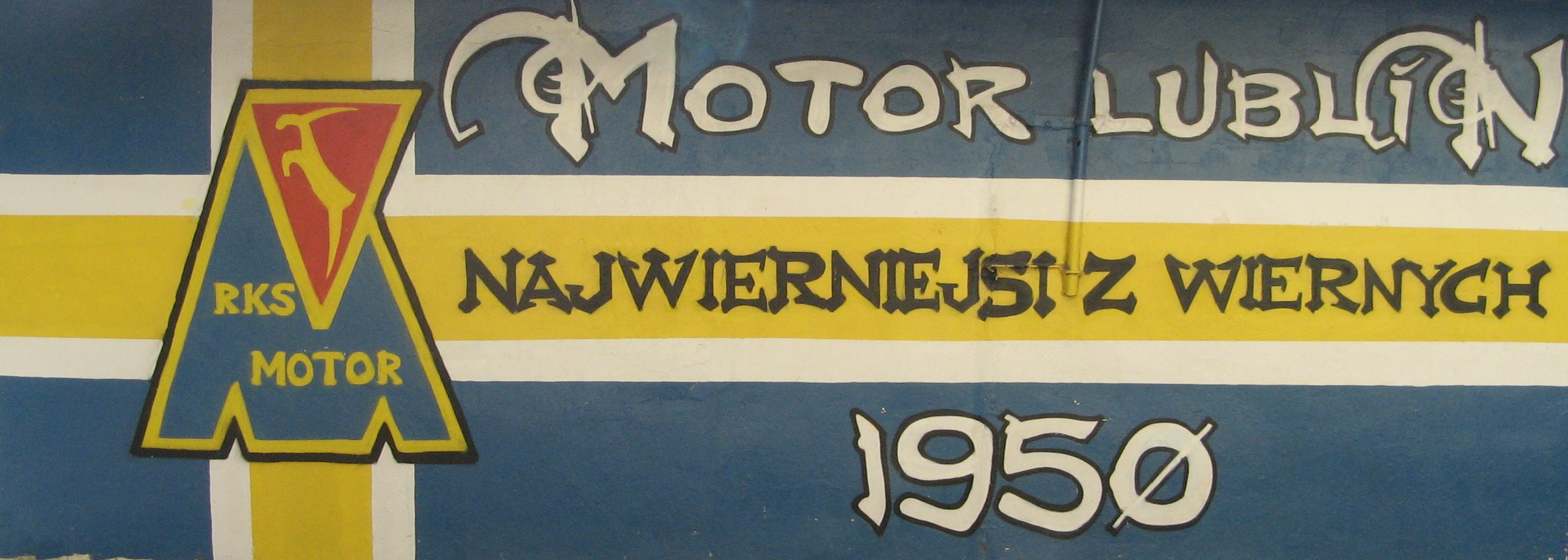 Graffiti Motoru Lublin na lubelskim osiedlu Kalinowszczyzna